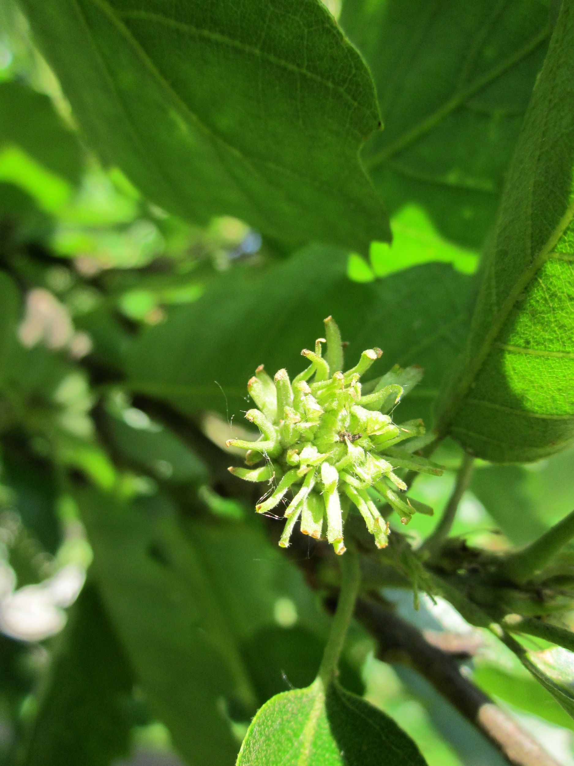 Zerreiche (Quercus cerris) am Friedrichsplatz (Karlsruhe)